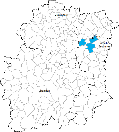 Carte de situation du canton d'Évry-Sud en Essonne (91)